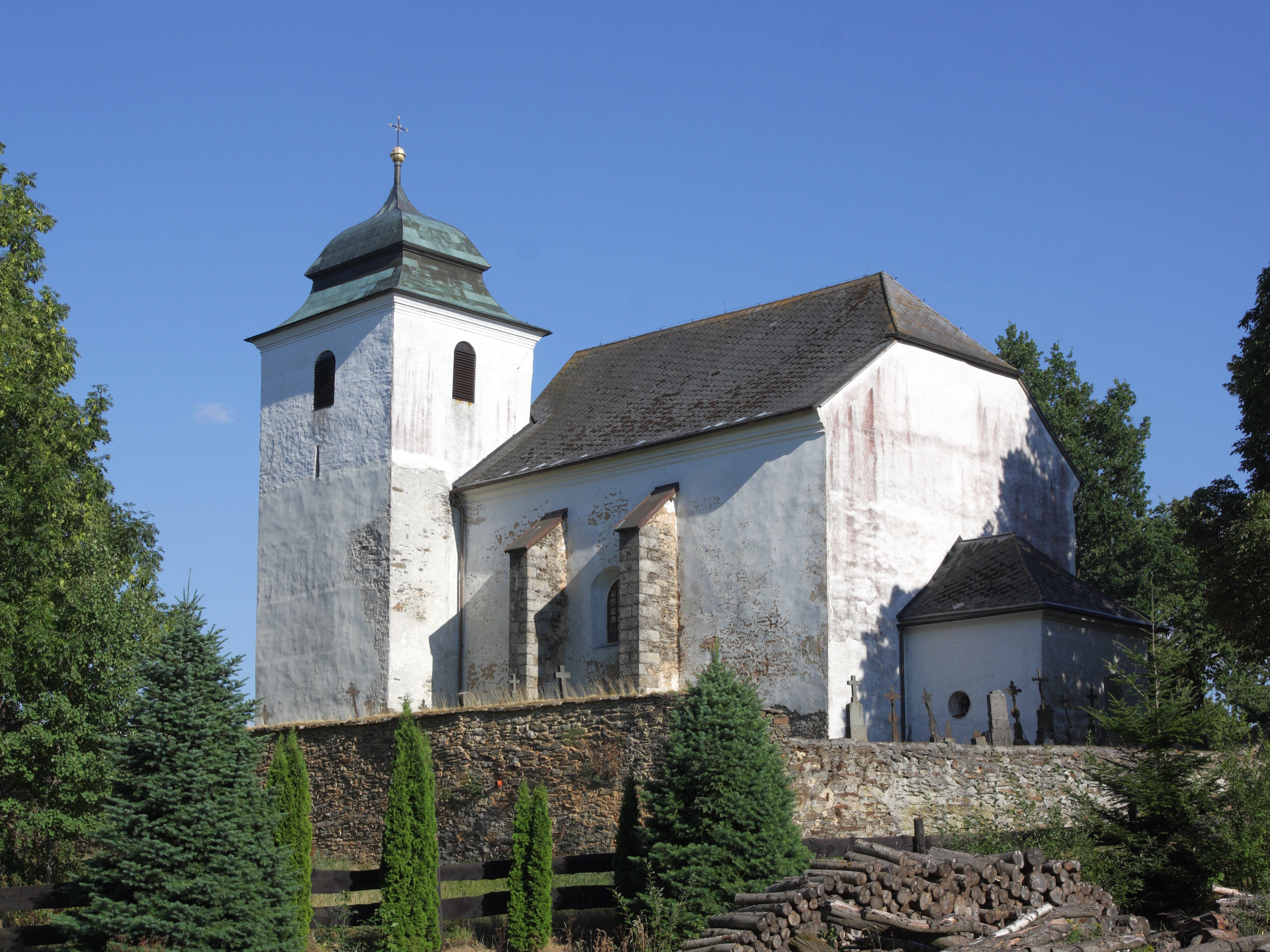 Hora Svatého Václava - kostel sv. Václava, pohled od SZ.